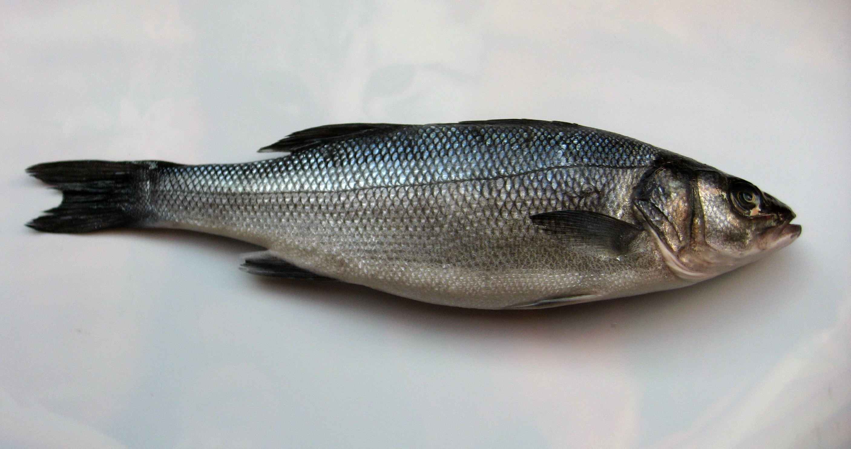 Mořčák evropský